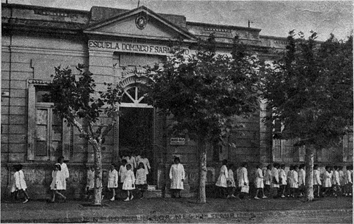 Escuela Domingo Faustino Sarmiento, Merlo, 1962.